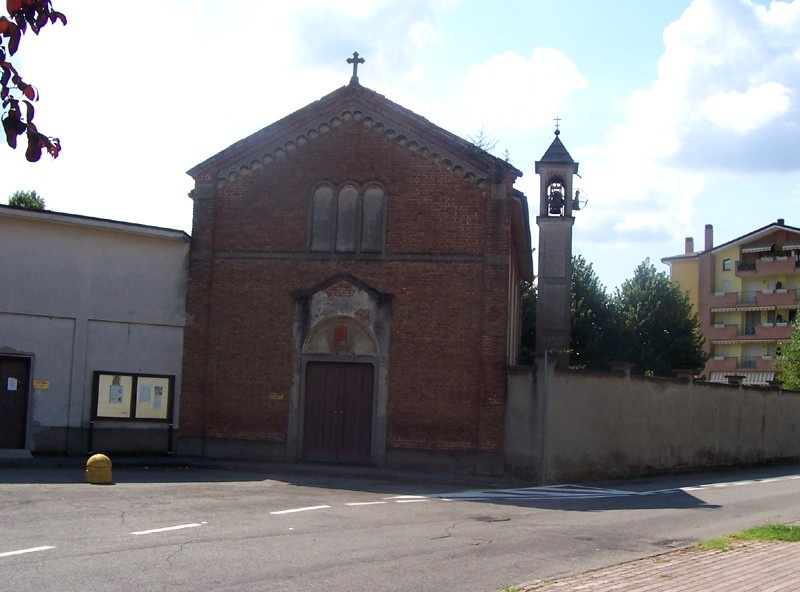 Caponago - Oratorio di S. Giorgio